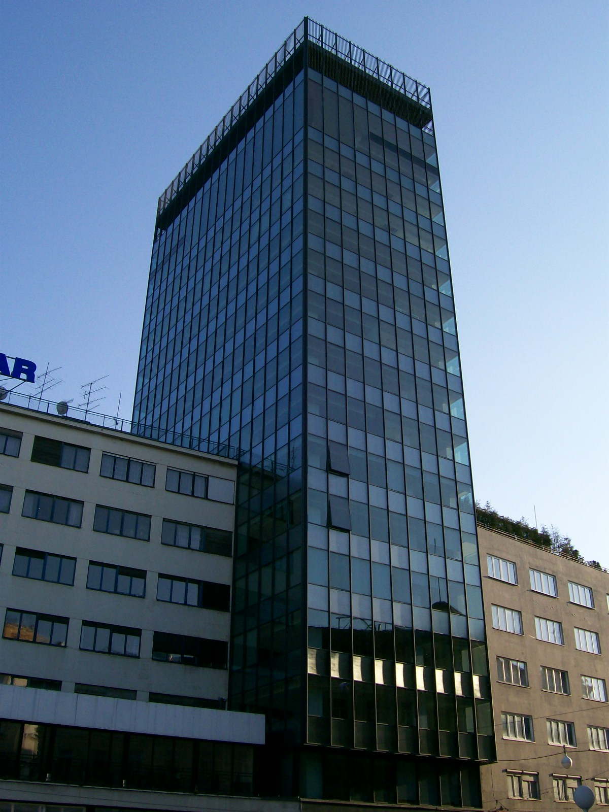 Neboder na početku Ilice, Zagreb